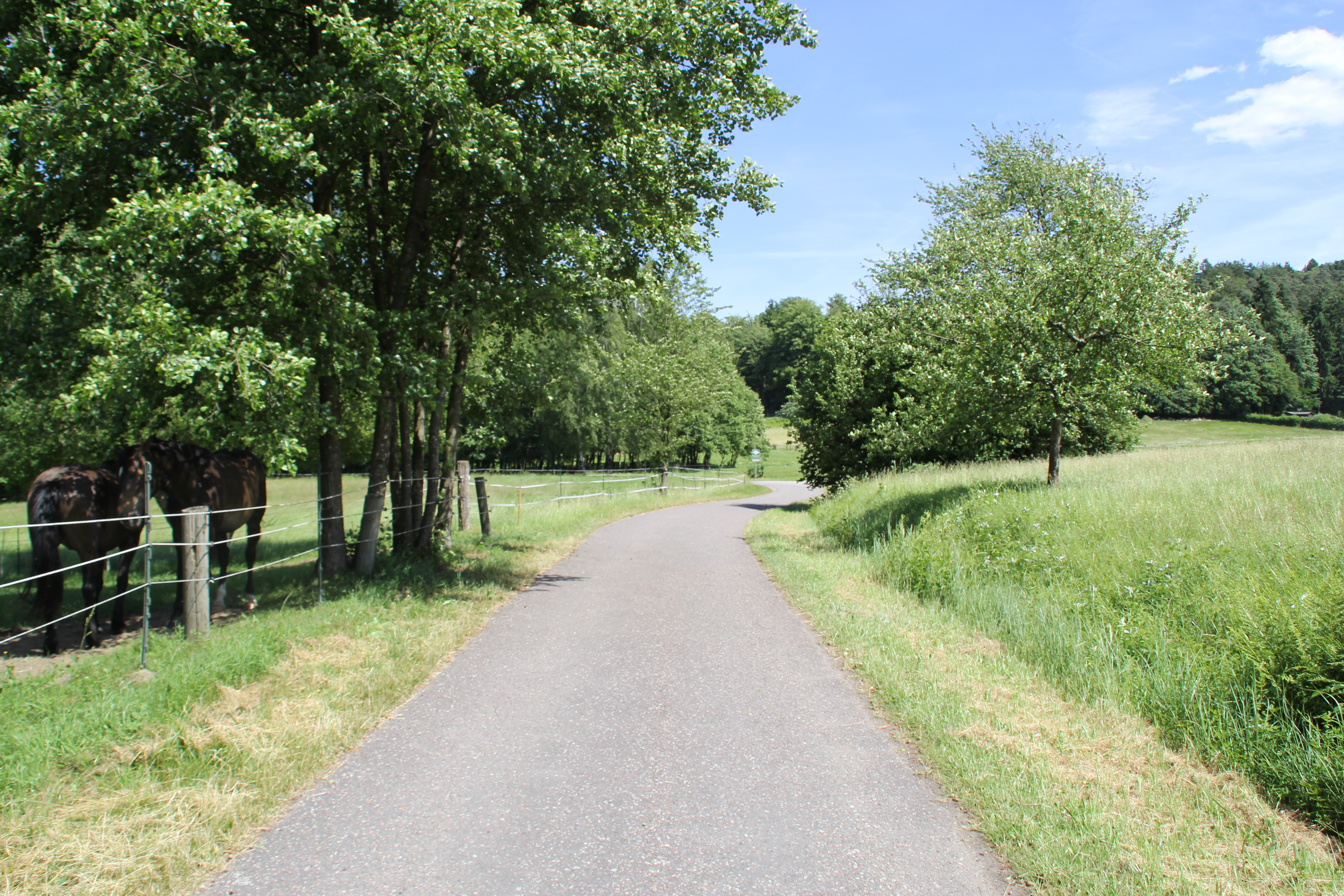 Kahltal-Spessart-Radweg bei Kleinkahl Richtung Kahlquelle